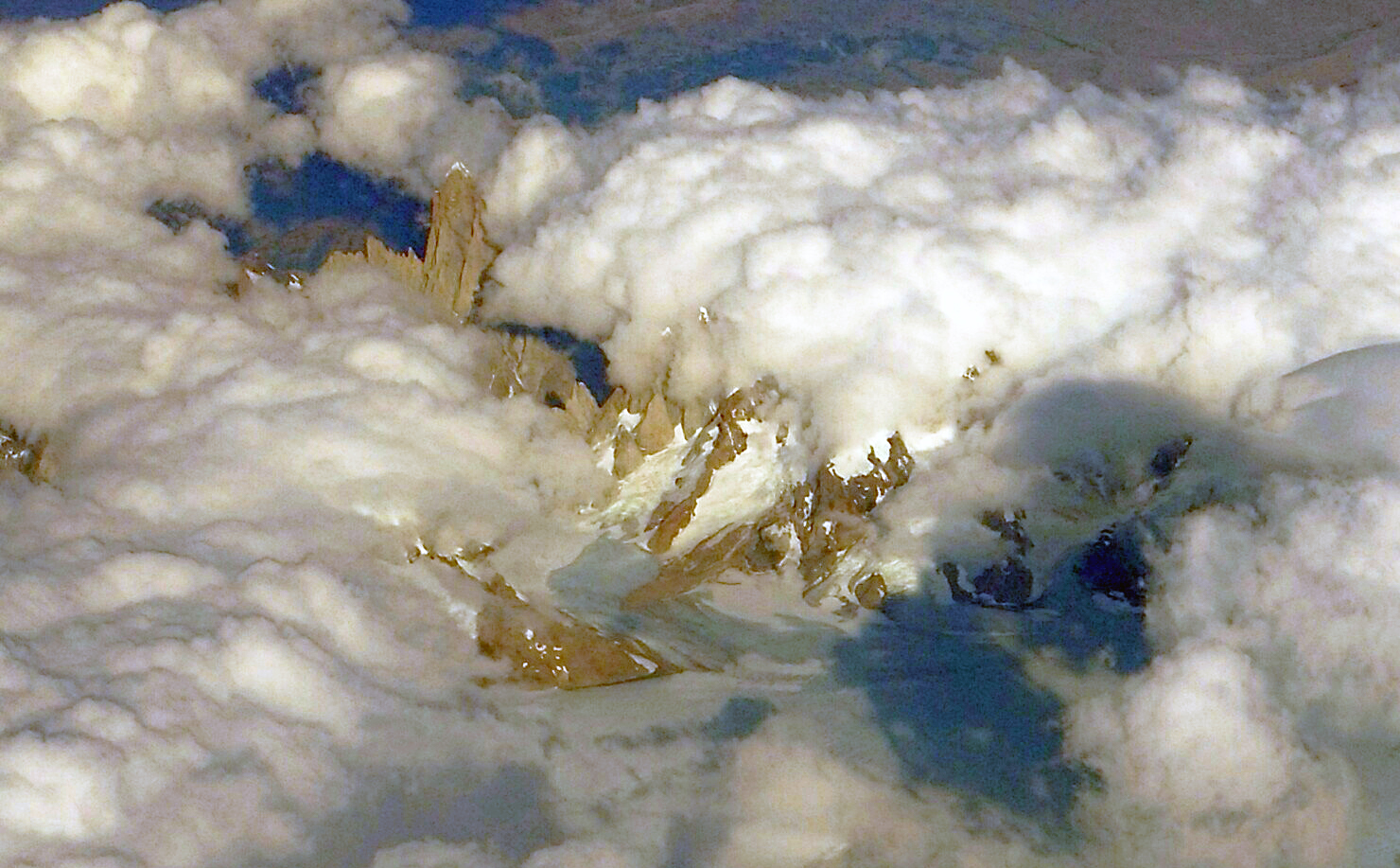 Circo de los Altares visto desde un avión